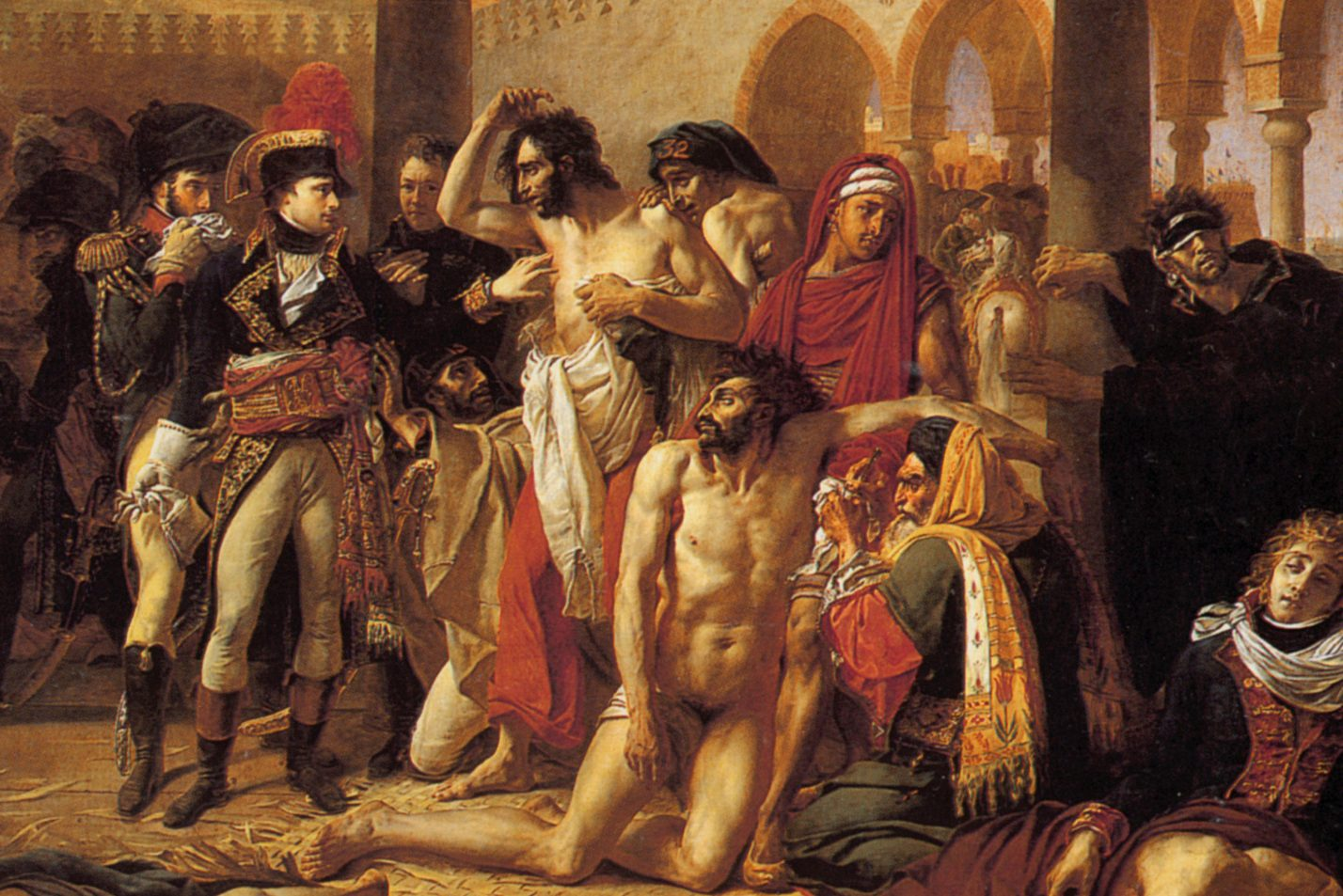 Détail du tableau de Antoine-Jean Gros